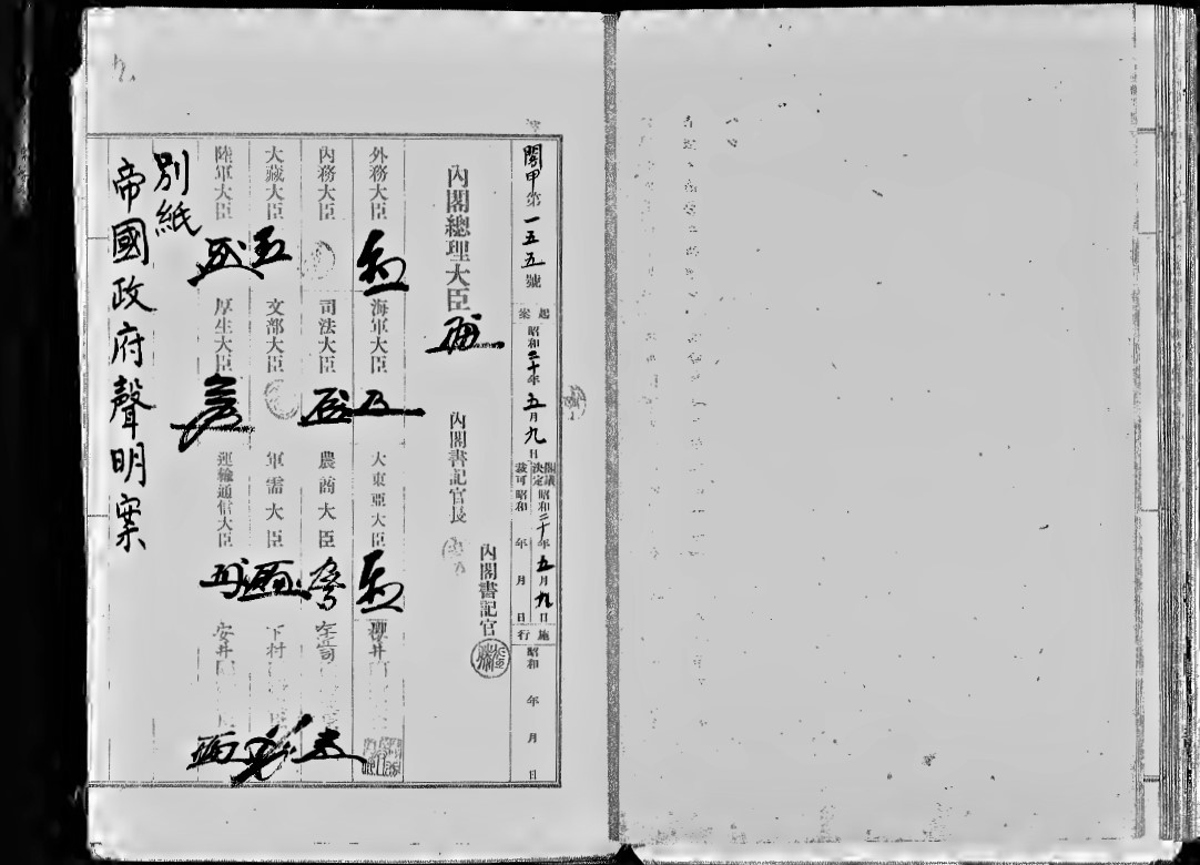 May 9, 1945 Japanese Government statement